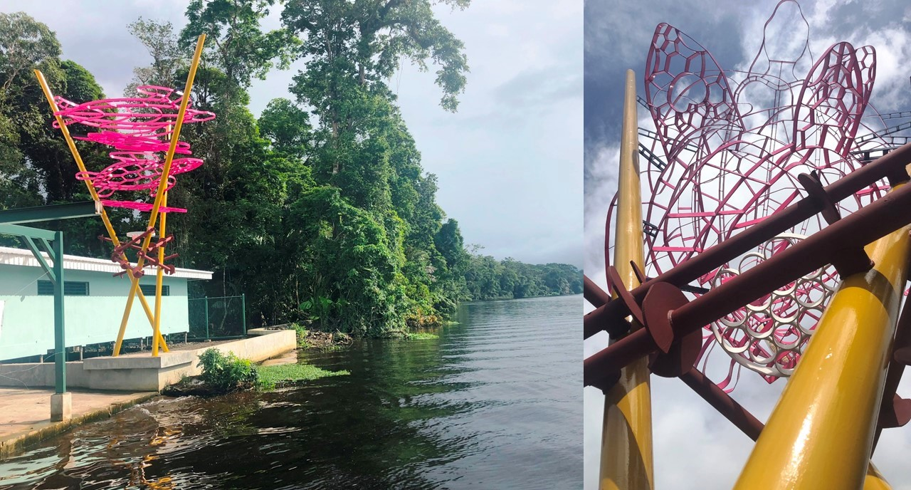 Vista del Puesto Operativo 4 Esquinas, Parque Nacional Tortuguero, Cariari, Pococí, Limón, Costa Rica